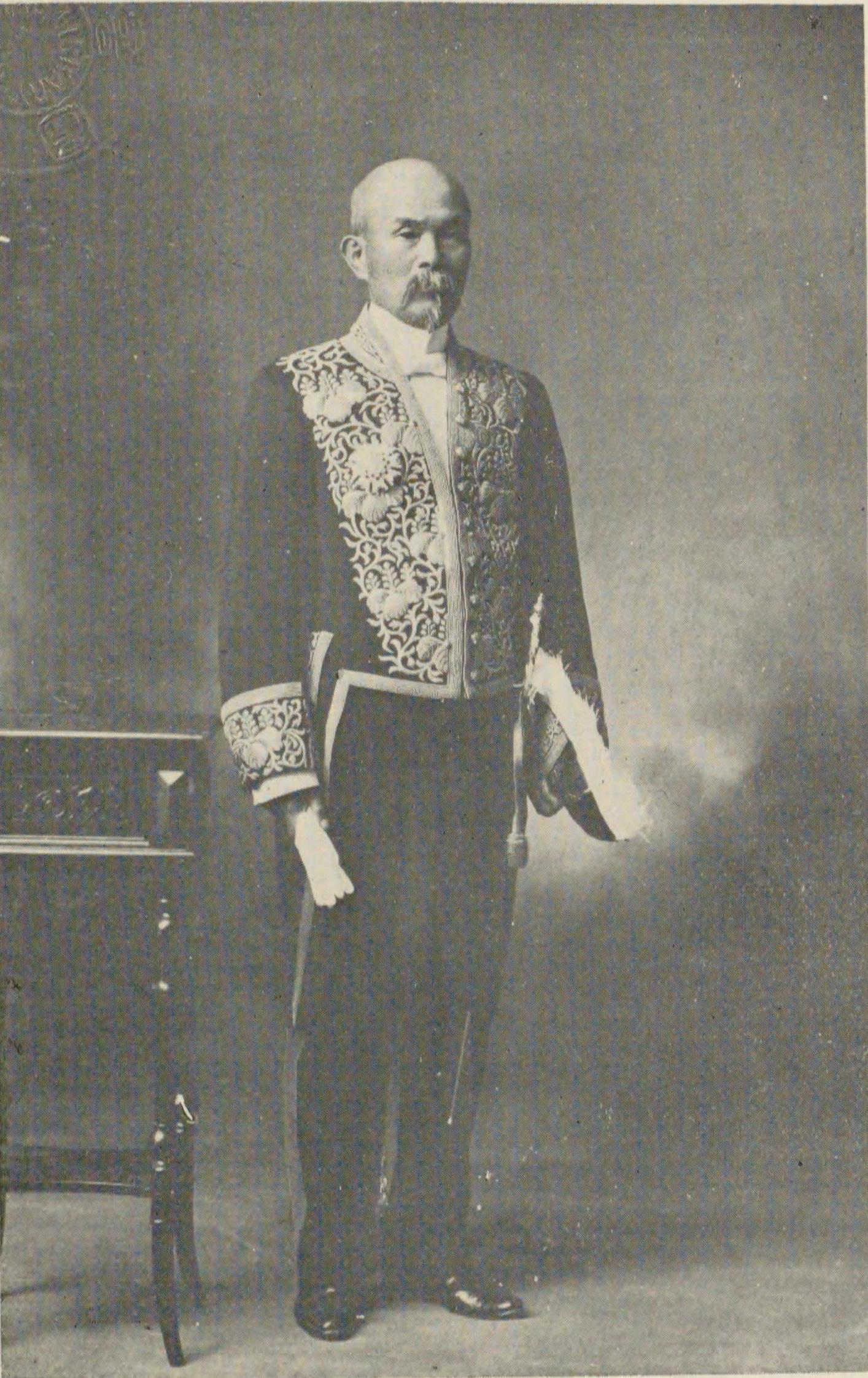 函館時代の一瀬勇三郎